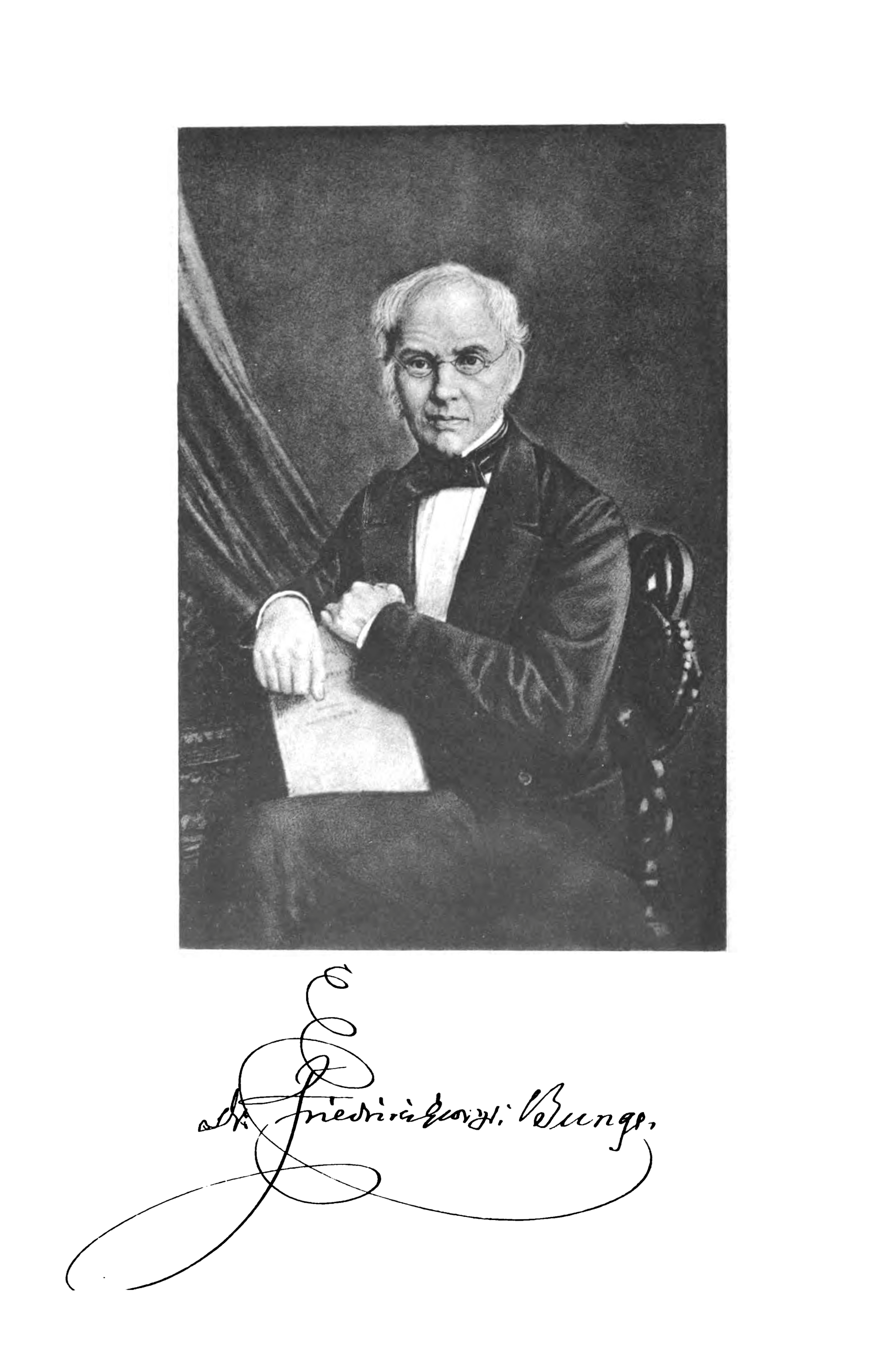 Friedrich Georg von Bunge (1802-1897), baltischer Rechtshistoriker